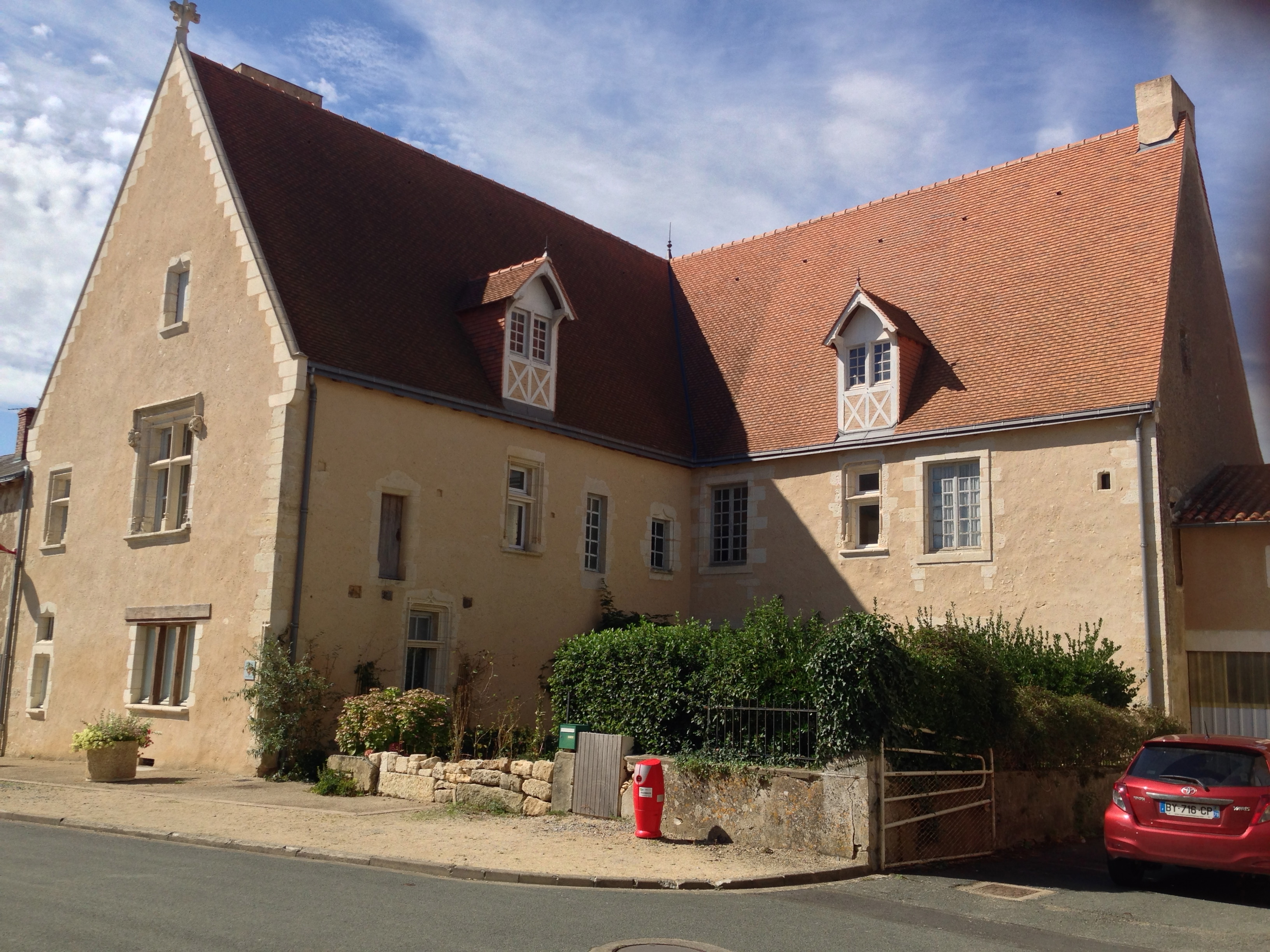 Vieux logis médiéval des abbesses de Sainte-Croix de Poitiers